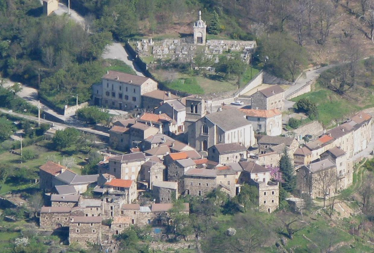 Village de sablières (Ardèche)